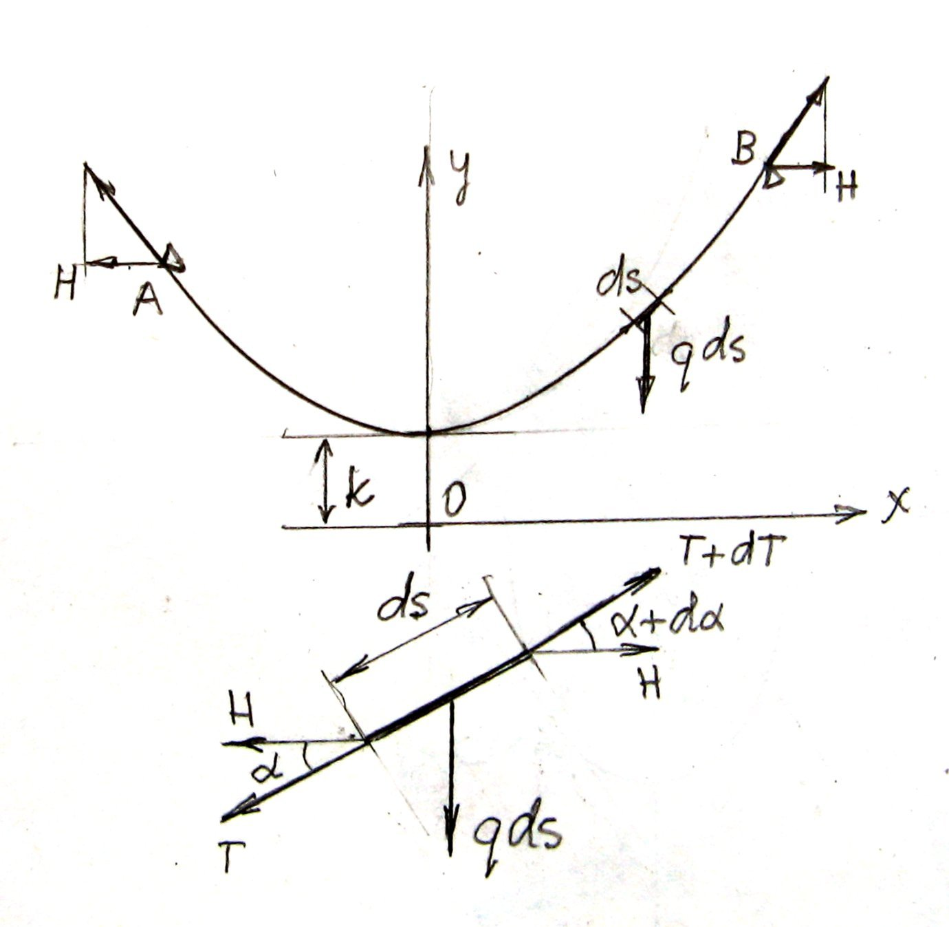 Cięgno